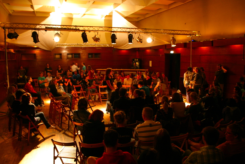 StudioHdF im Peter-Weiss-Haus 2010